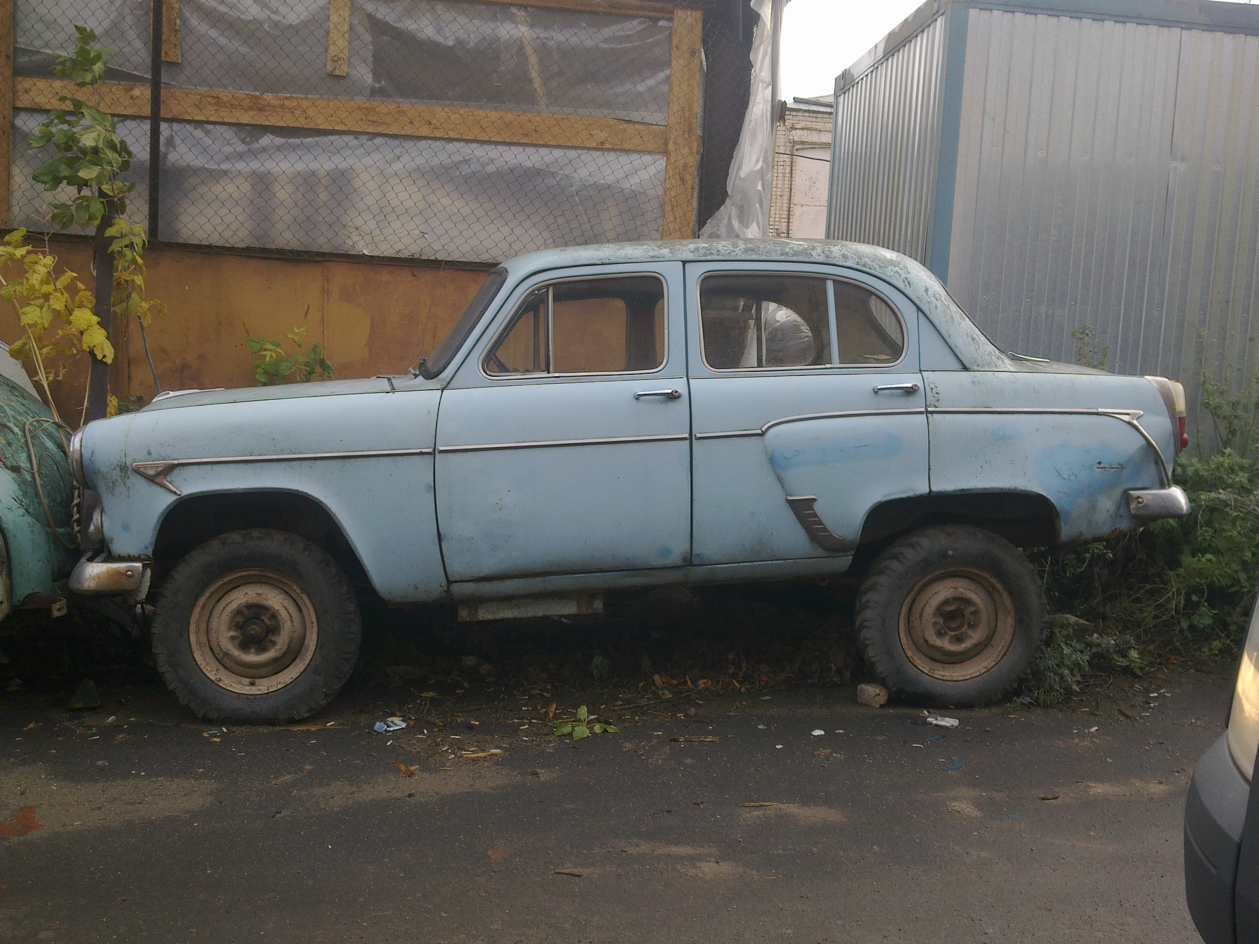 На одной из баз вМоскве.